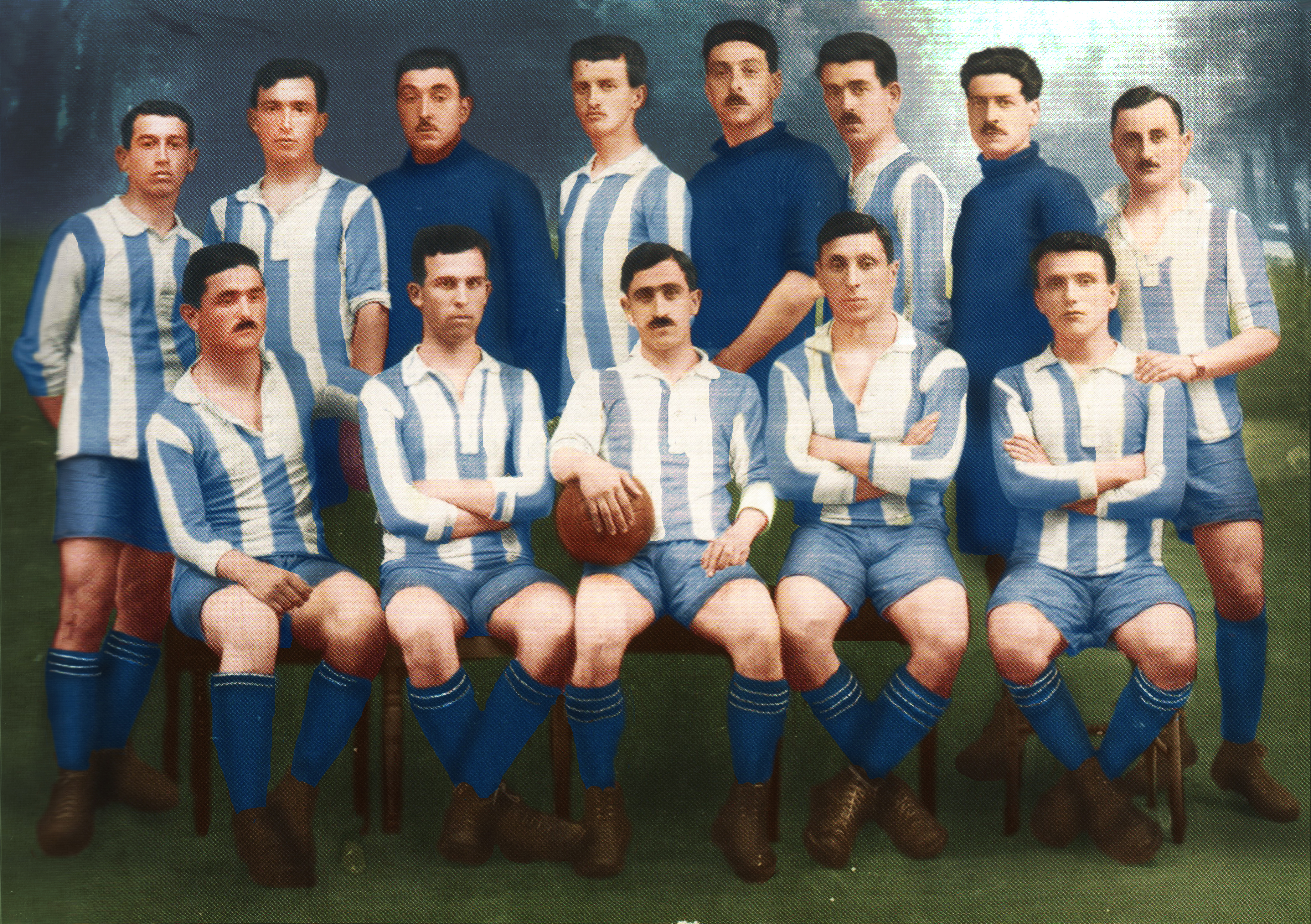 Η Ελληνική Στρατιωτική ομάδα ποδοσφαίρου που συμμετείχε στους Πανσυμμαχικούς Αγώνες στο Παρίσι το 1919. Από αριστερά επάνω: Λουκάς Πανουργιάς, Λ. Τραγανός, άγνωστος, Δ. Δεμερτζής, Βαγγέλης Κουρέντης, Γ. Δεμερτζής, Κ. Κστρίτσης, Μ. Ισαΐας Αριστερά κάτω: Γρ. Βλαχόπουλος, Γιάννης Σταυρόπουλος, Ιωσήφ Τερζάκης, Γιώργος Καλαφάτης, Γιώργος Χατζηανδρέου Χρωματική επεξεργασία: user Sportingn